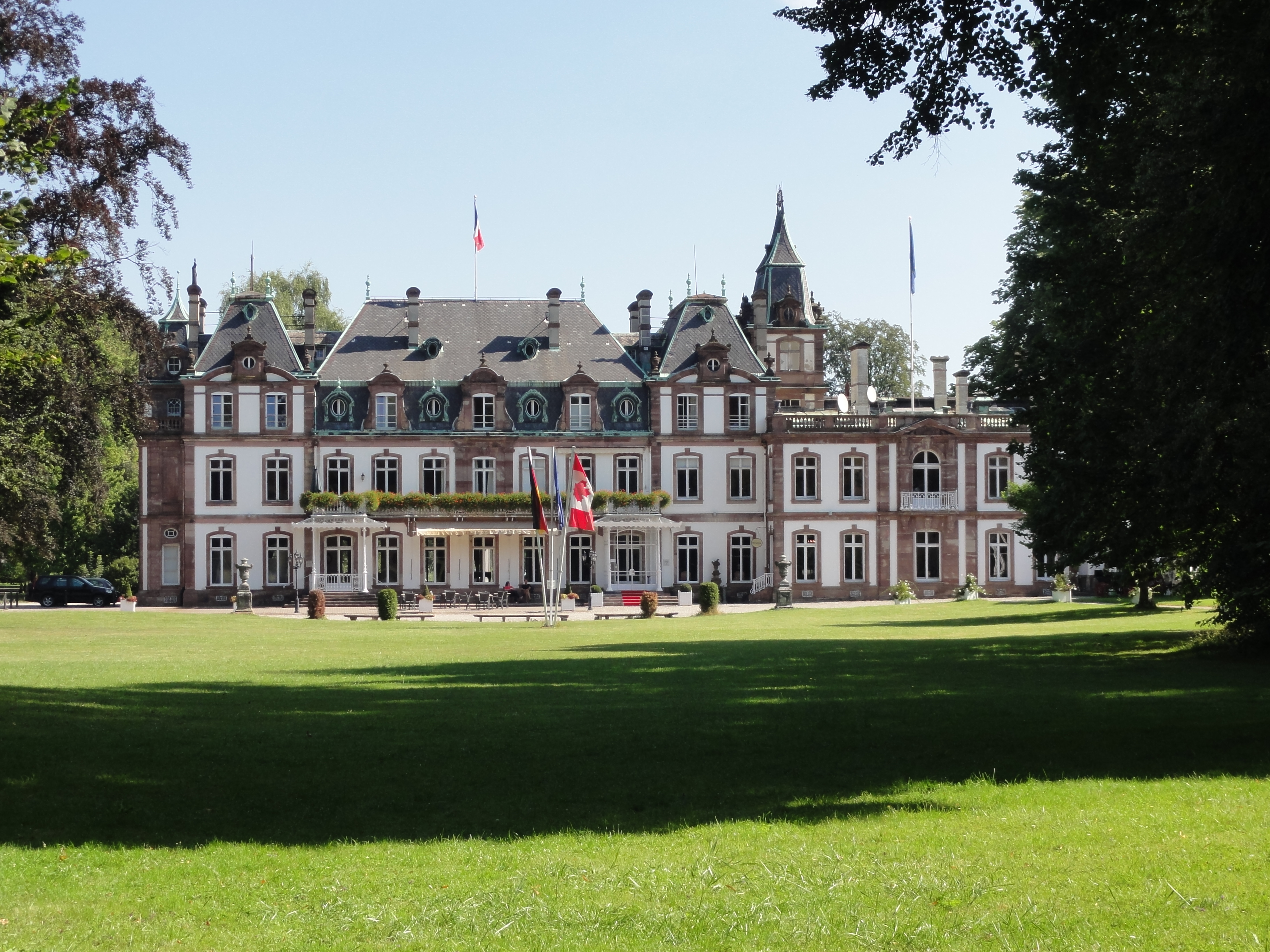 Alsace, Bas-Rhin, Strasbourg, Château de Pourtalès (XVIIIe-XIXe), rue Mélanie.